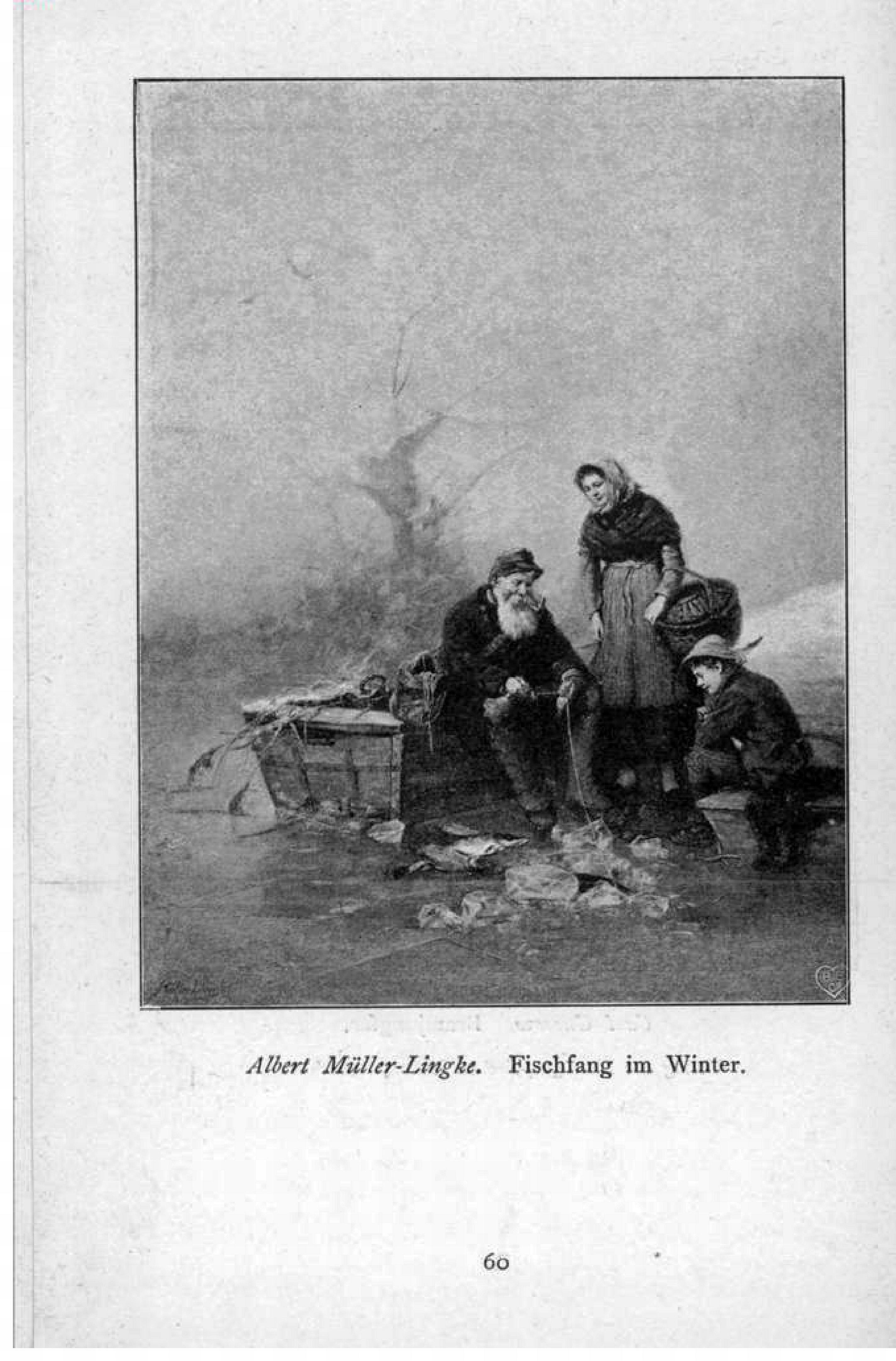 Fischfang im Winter